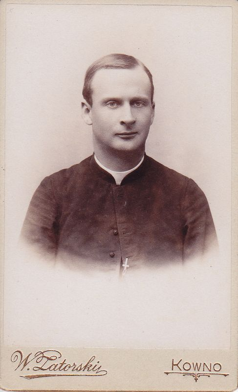 Pranciškus Petras Būčys (1872–1951) as a student